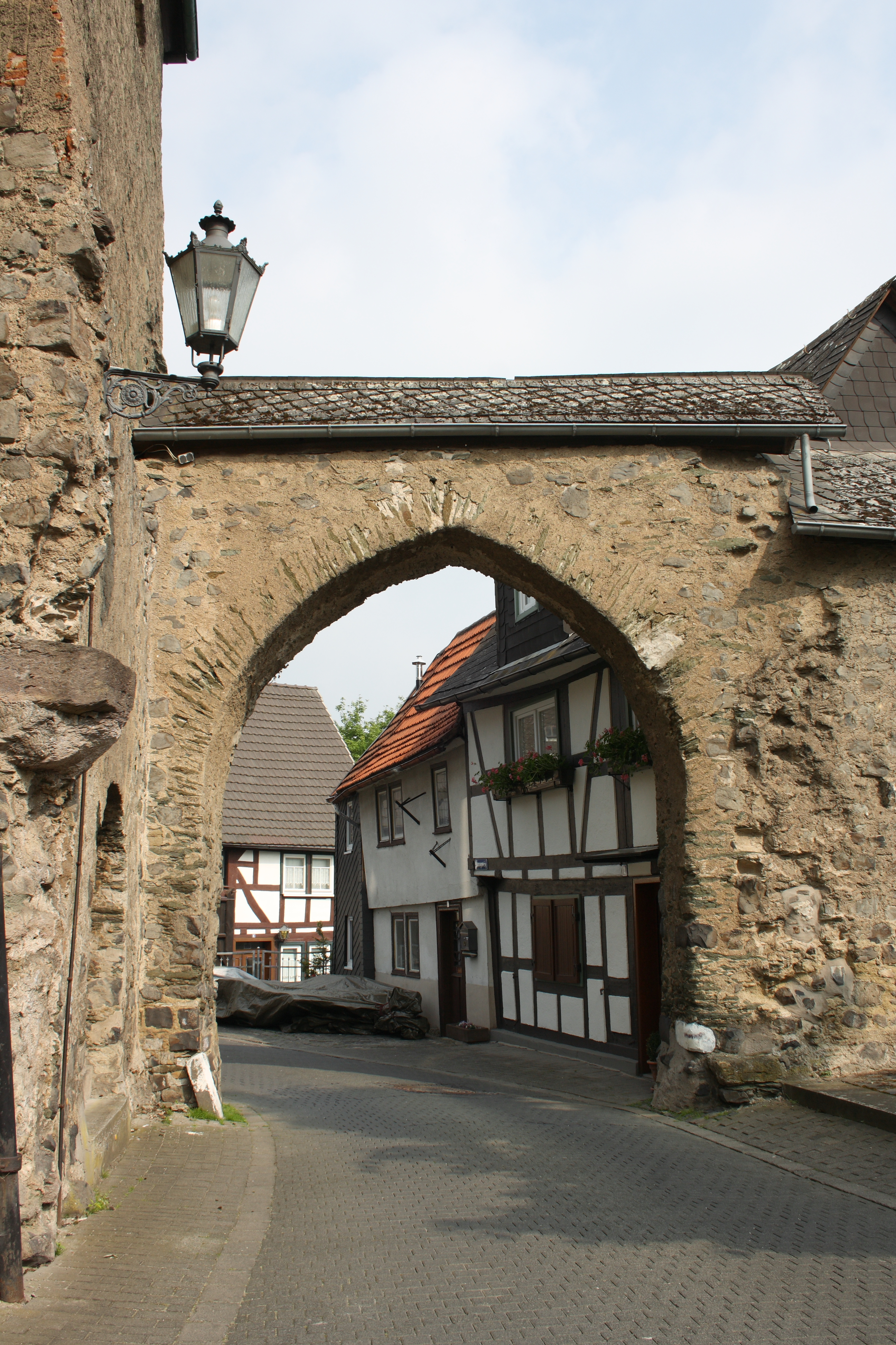 Hinterthäler Pforte in Braunfels im Lahn-Dill-Kreis (Hessen)